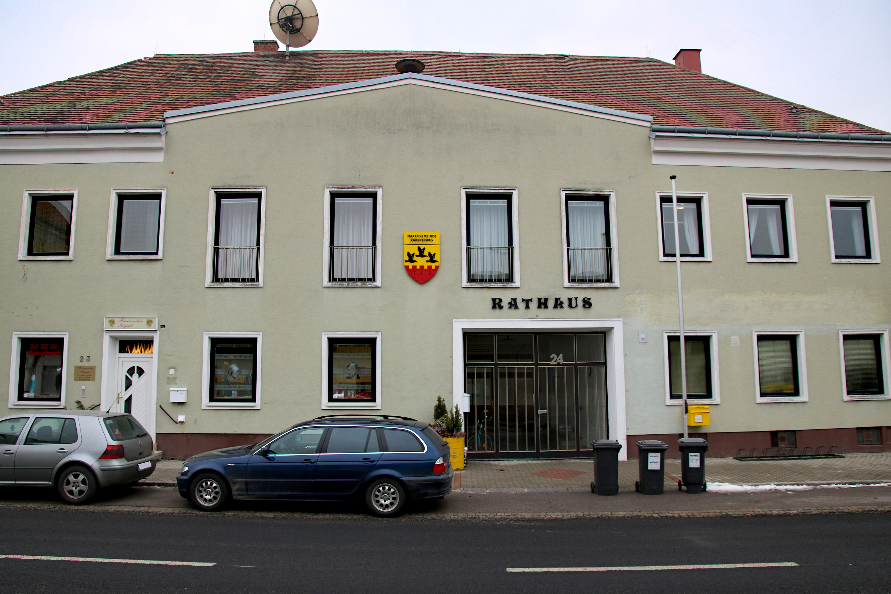 Gemeindeamt Rabensburg Niederösterreich Austria